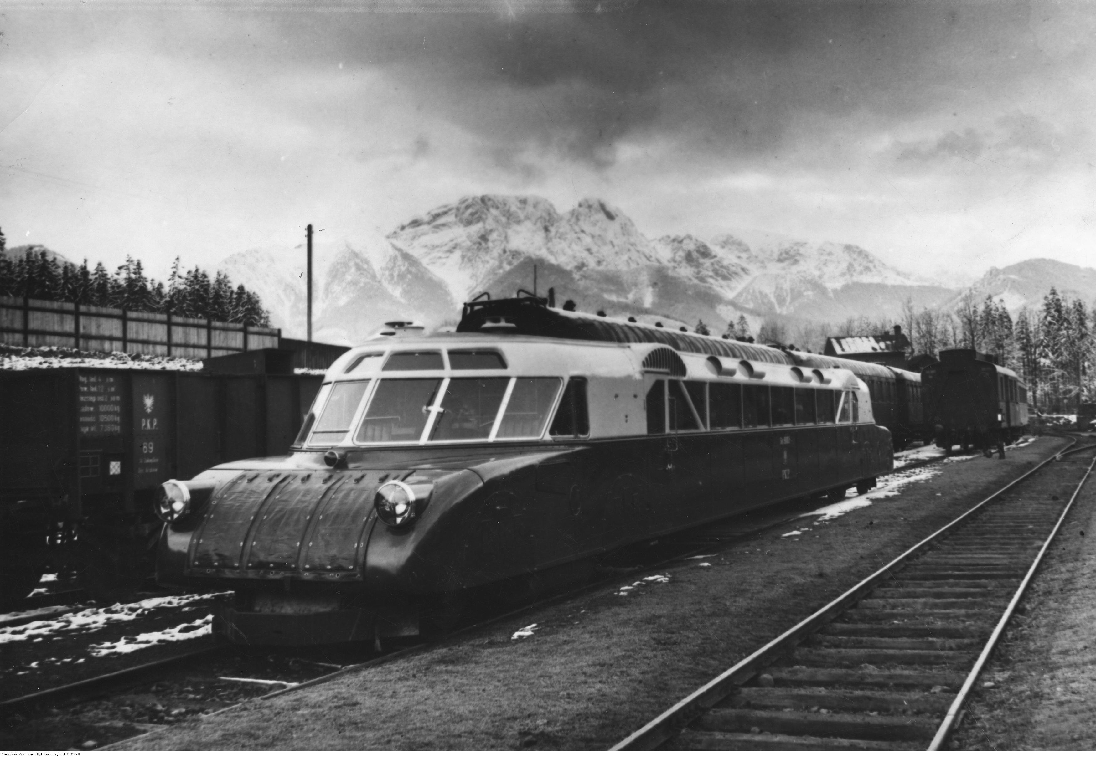 "Torpeda podhalańska" (Luxtorpeda, prędkość maksymalna: 115 km/h) na dworcu kolejowym w Zakopanem w Polsce w 1936 r. W tle Giewont.